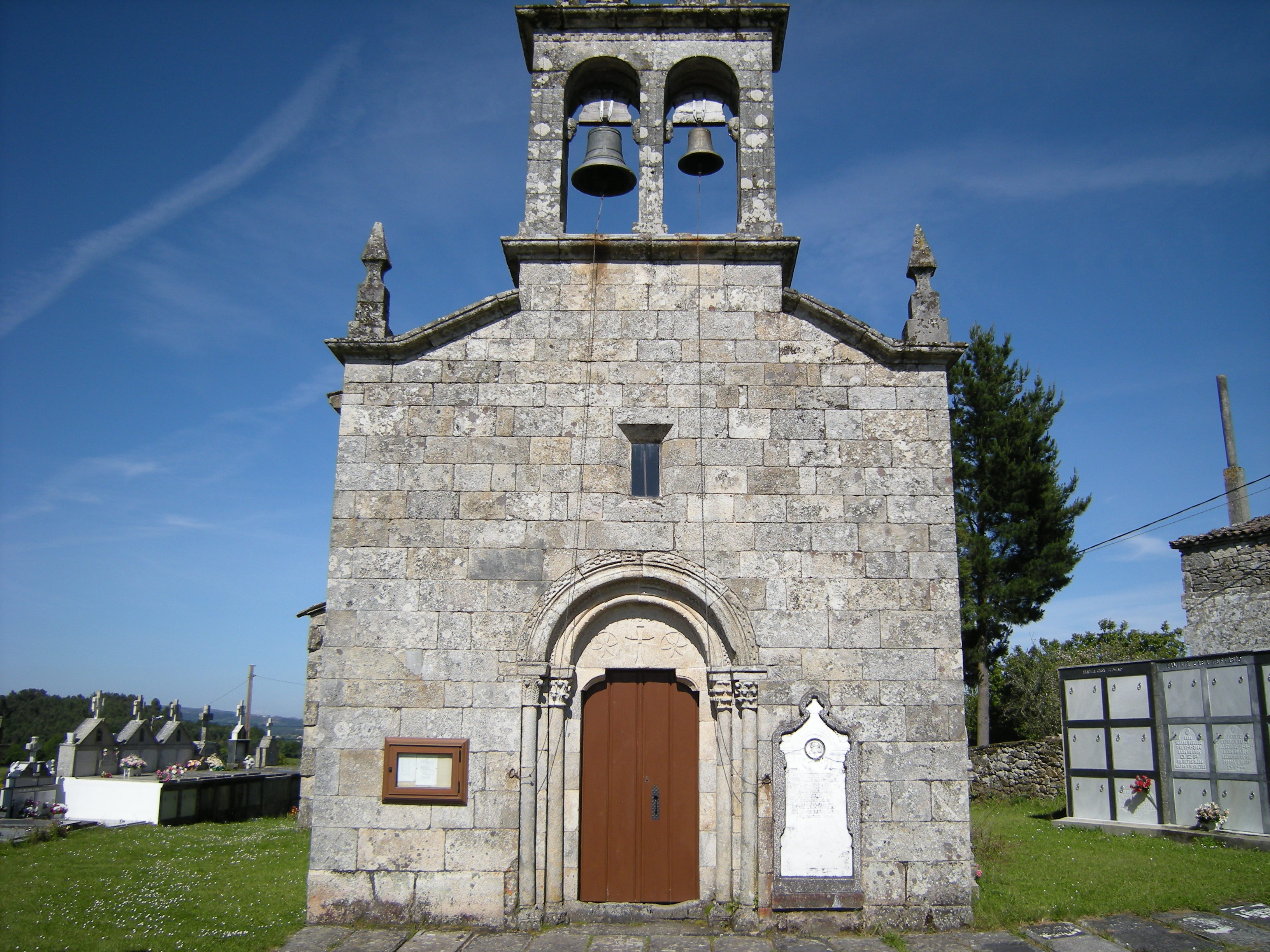 Igrexa de San Lourenzo de Peibás, no concello de Antas de Ulla